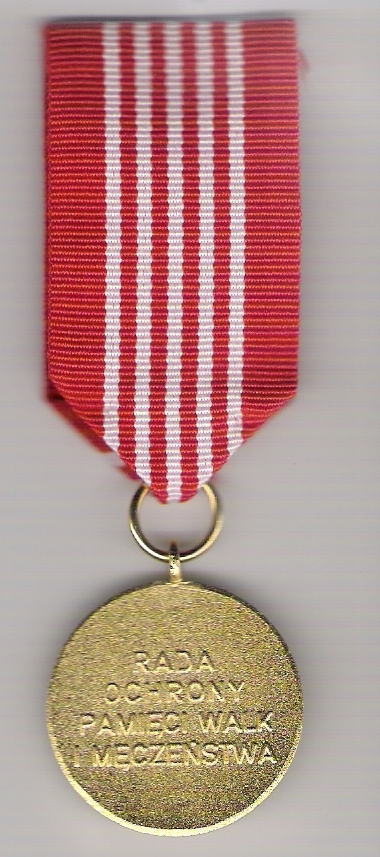 Rewers Złotego Medalu Opiekuna Miejsc Pamięci Narodowej